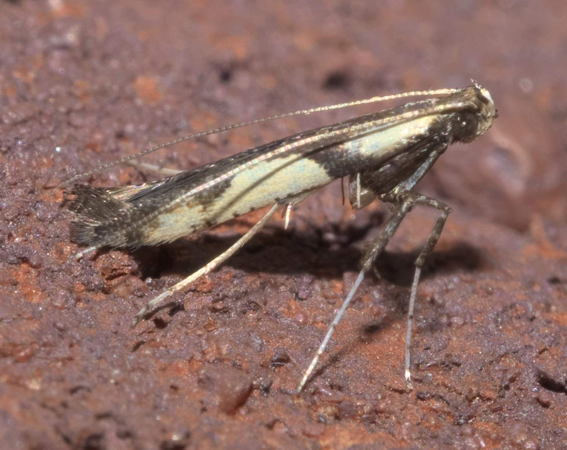 Caloptilia blandella, walnut caloptilia, Size: 5.4 mm, ID Confidence: 90